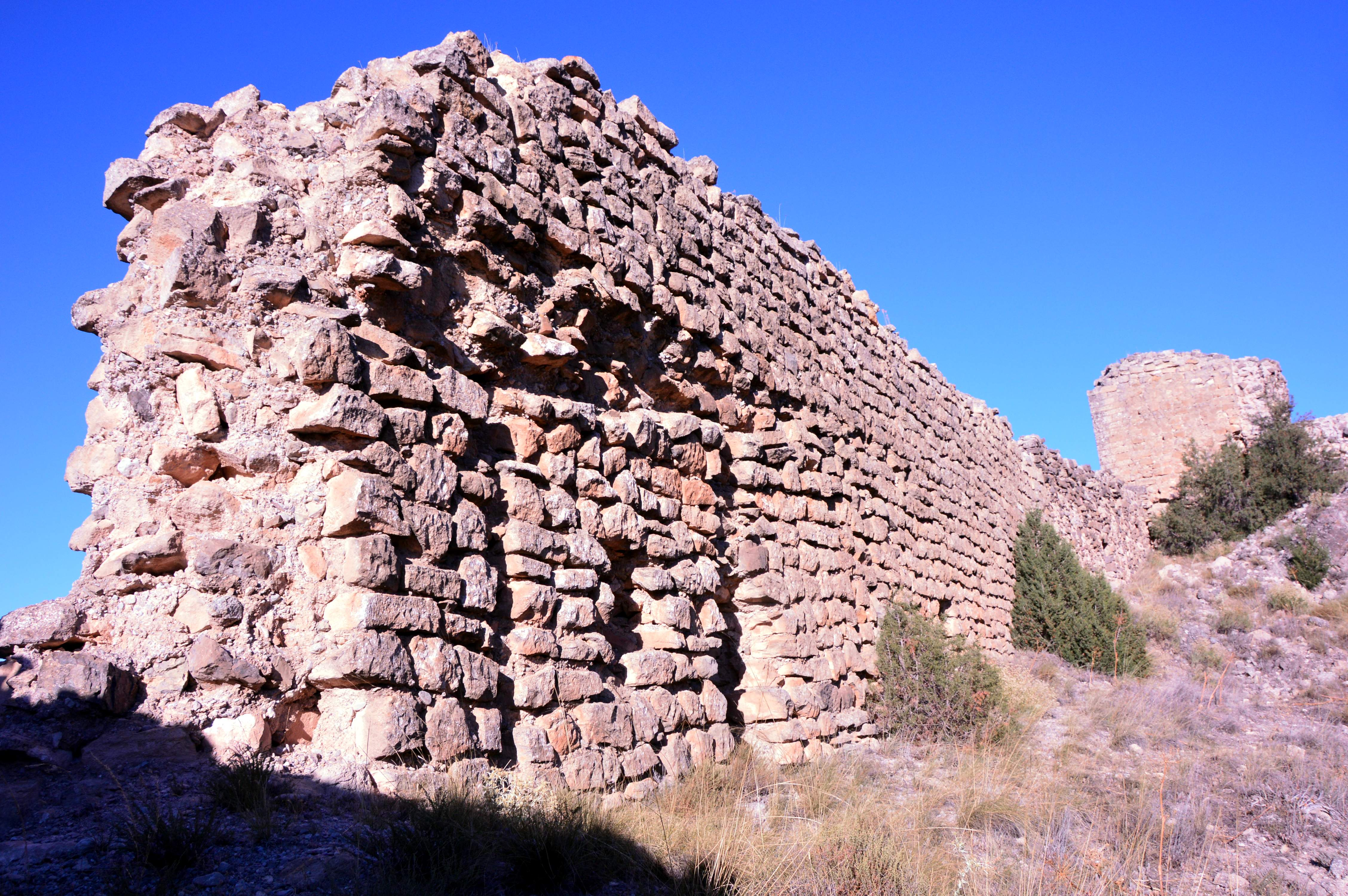 Vista parcial (suroccidental) de las ruinas del Castillo de Valacloche con detalle de lienzo de muralla y torre del Homenaje al fondo (2017).